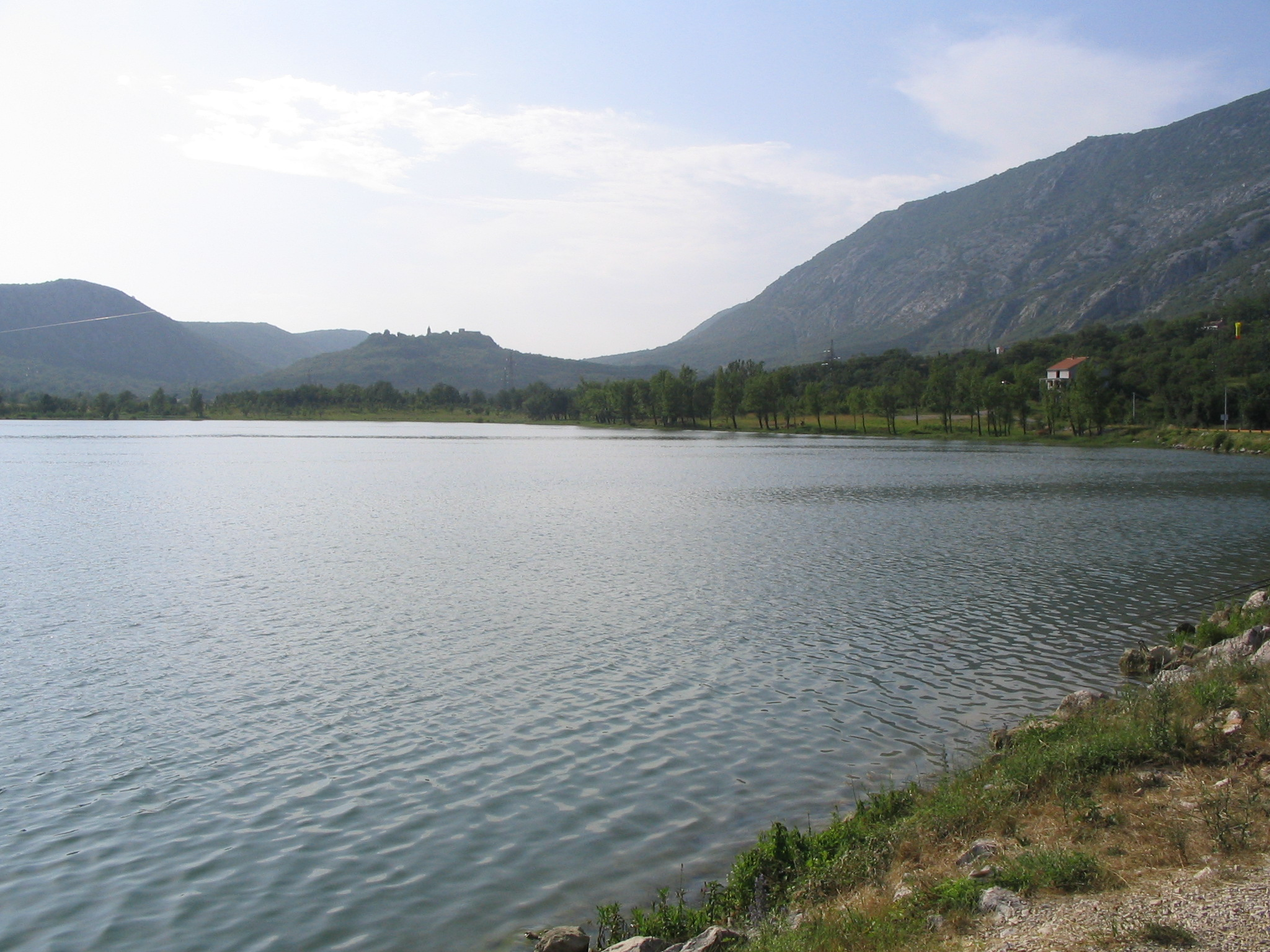 Tribaljsko jezero, Croatia